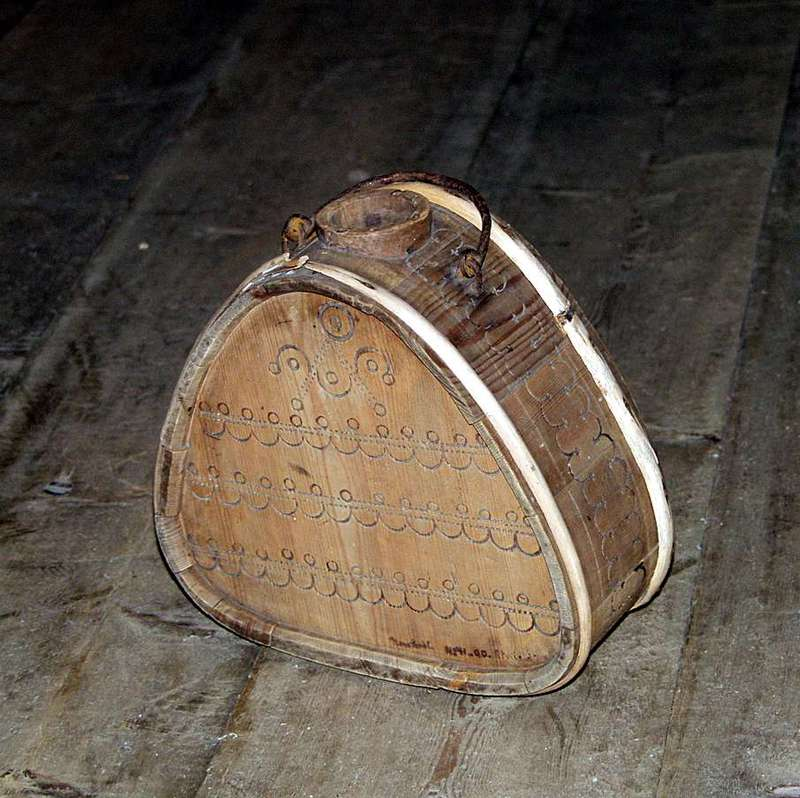 Treflake fra Hordaland, dekorert med svidekor, antakelig fra begynnelsen av 1800-tallet. Høyde 28 cm. Foto Haakon Harris / Norsk Folkemuseum NF.1900-0041.